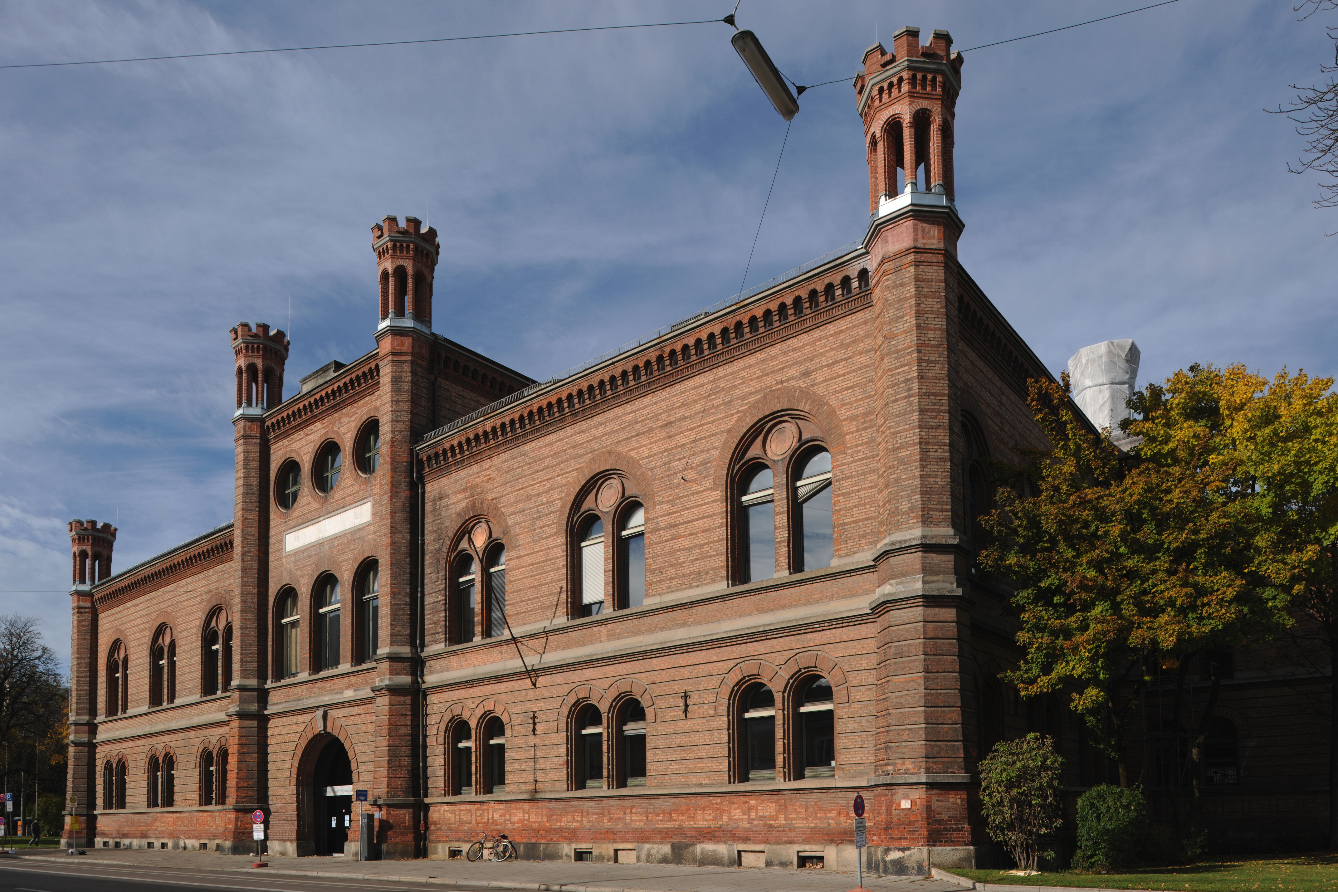 München, Fassadenteilansicht Lothstraße 17. Ehemaliges Zeughaus, jetzt Institute der Technischen Universität, symmetrische Mehrflügelanlage, Rohbackstein mit Zinnentürmchen, 1863–65 von Matthias Glaeser.